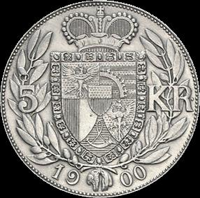 5 Kronen, 1900 (Liechtenstein) - reverse